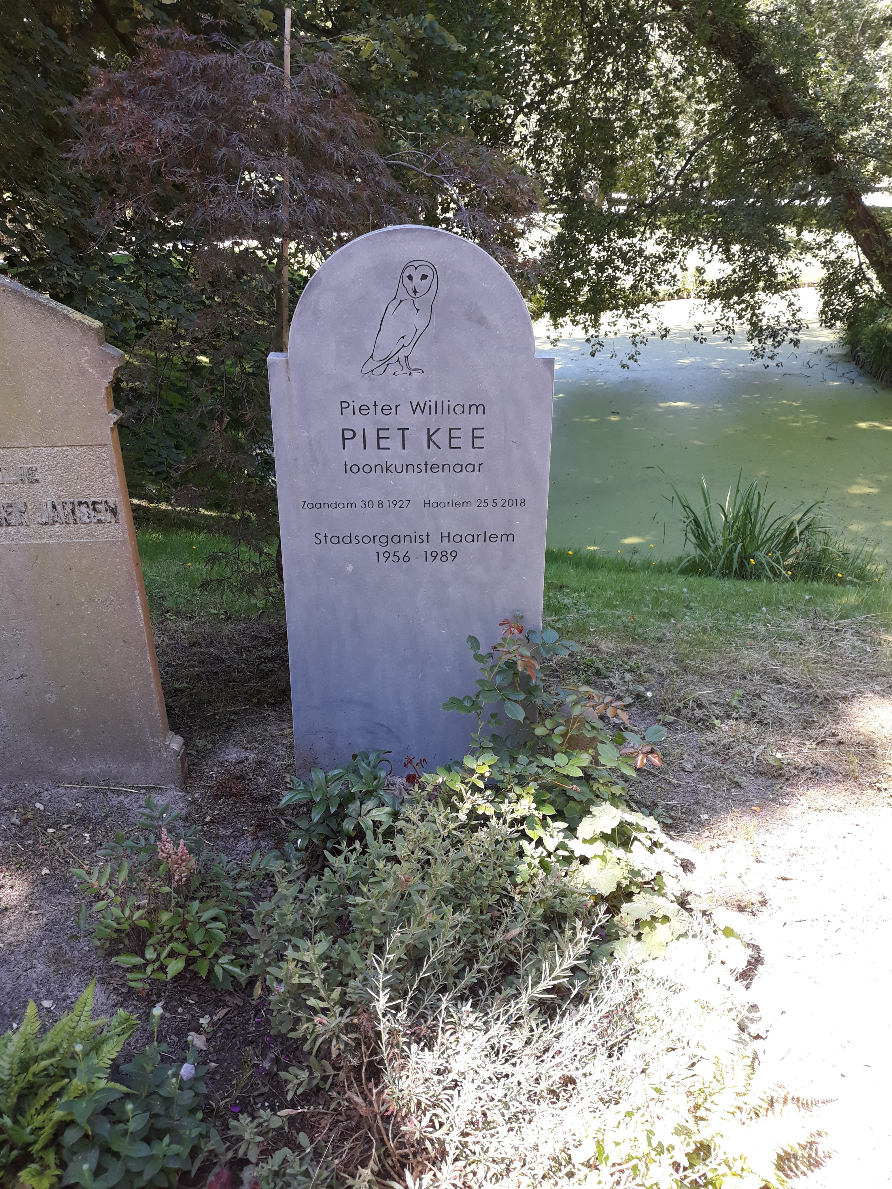 Das Grab des niederländischen Organisten Piet Kee auf dem Friedhof Kleverlaan in Haarlem.